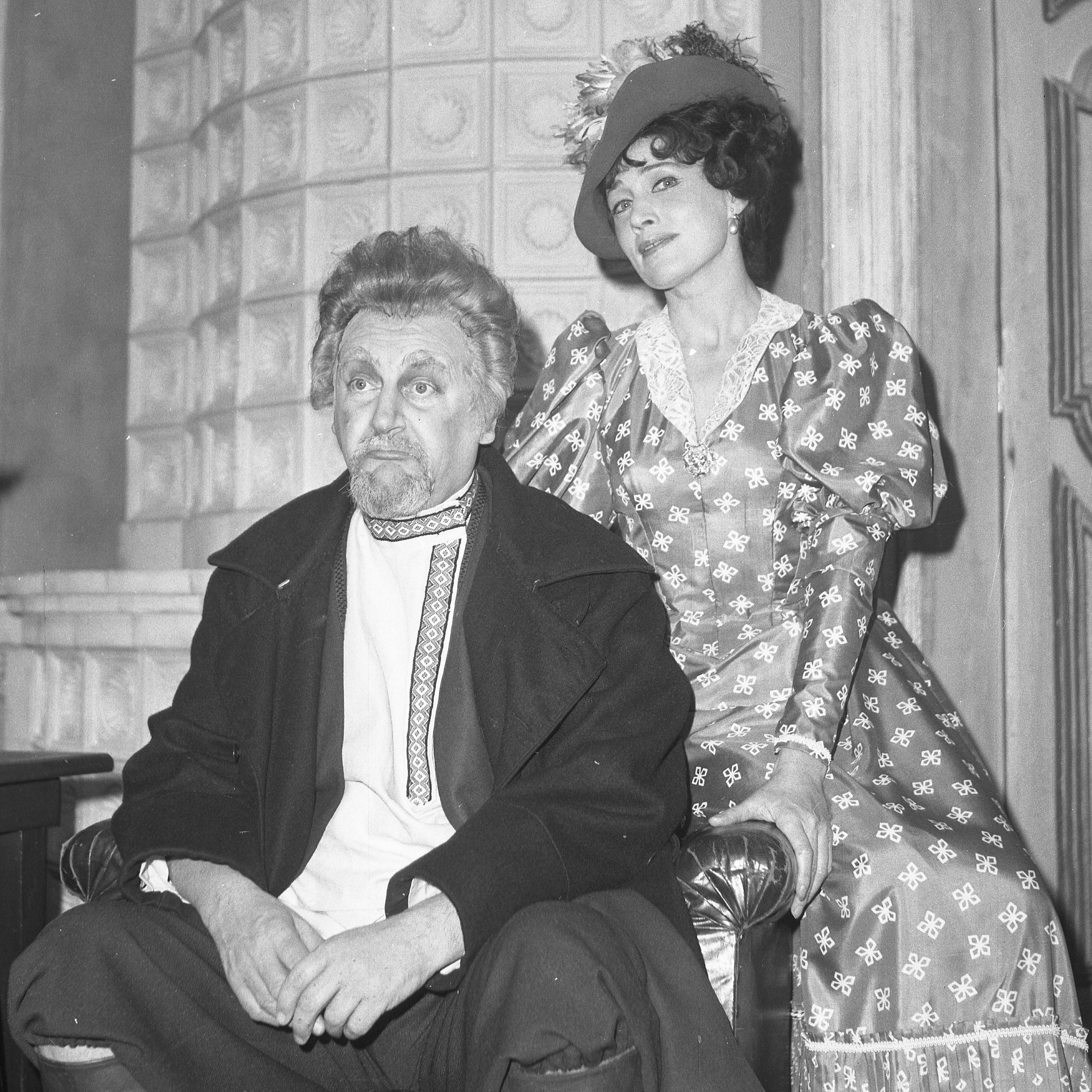 Format: 120 mm sort/hvitt negativ [utsnitt] Dato / Date: 1968 Fotograf / Photographer: Eirik Sundvor (1902 - 1992) Sted / Place: Den Nationale Scene, Bergen Wikipedia: Rolf Berntzen (1918 - 2005) Store Norske Leksikon: Karin Simonnæs (1924 - 1984) Wikipedia: Kirsebærhagen (Anton Tsjekhov 1904) Eier / Owner Institution: Trondheim byarkiv, The Municipal Archives of Trondheim Arkivreferanse / Archive reference: Tor.H43.B78.F14632